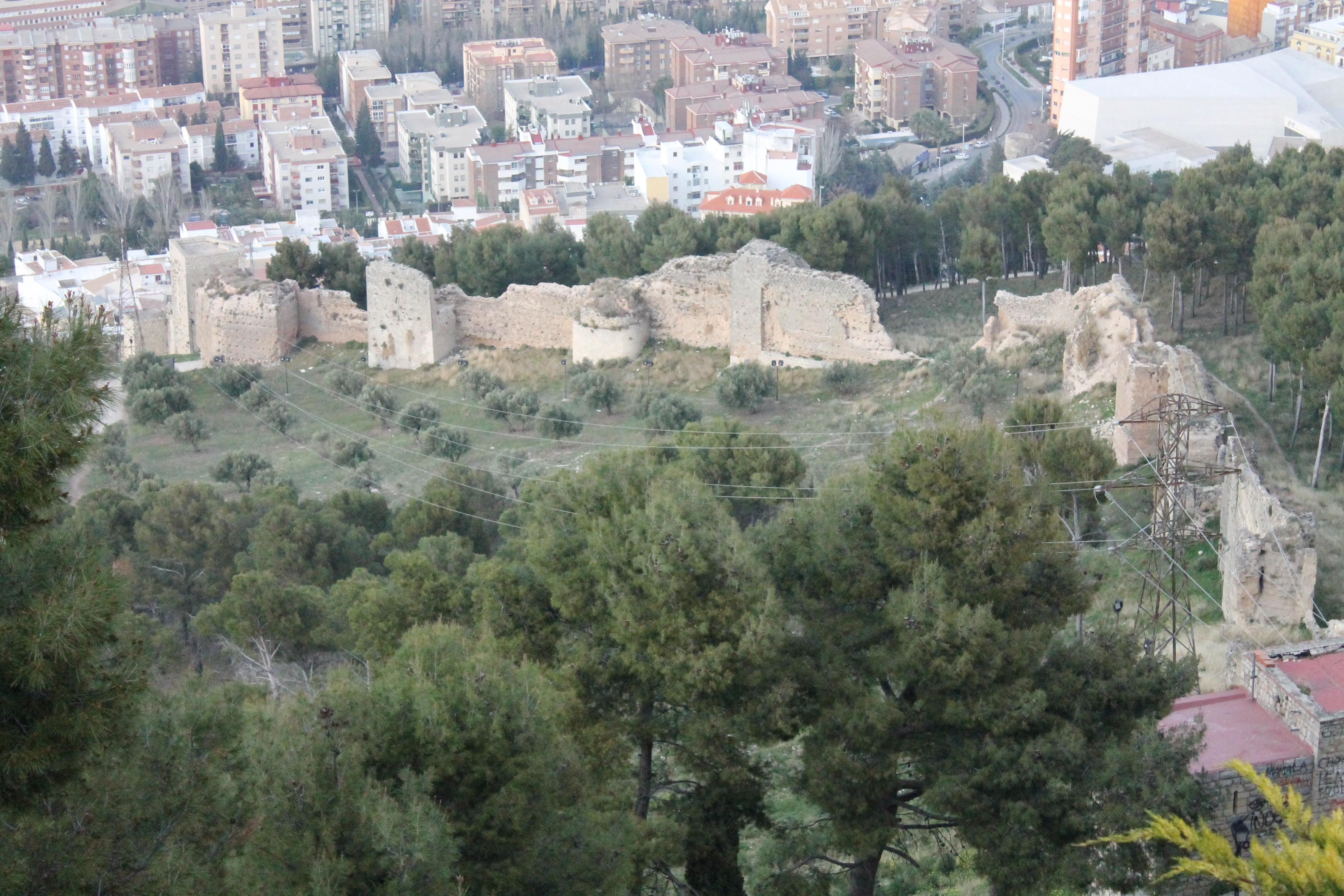 Murallas de Jaén vistas desde el Castillo de Santa Catalina.